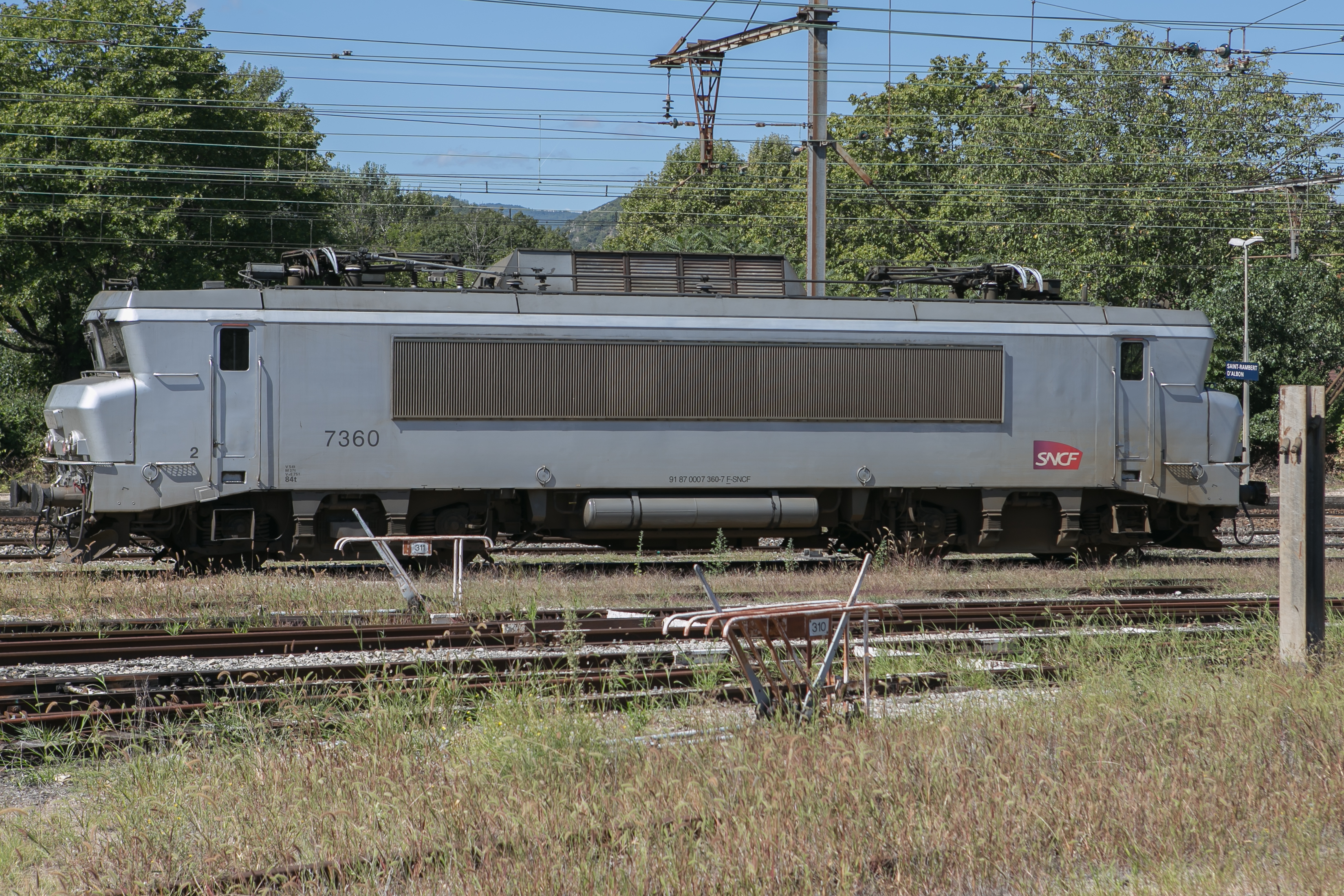 Locomotive BB7360 (classe BB 7200) dans la gare de Saint-Rambert-d'Albon (Saint-Rambert-d'Albon, Drôme, France)